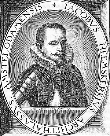 Jacob van Heemskerk